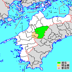 에히메현 가미우케나군의 위치